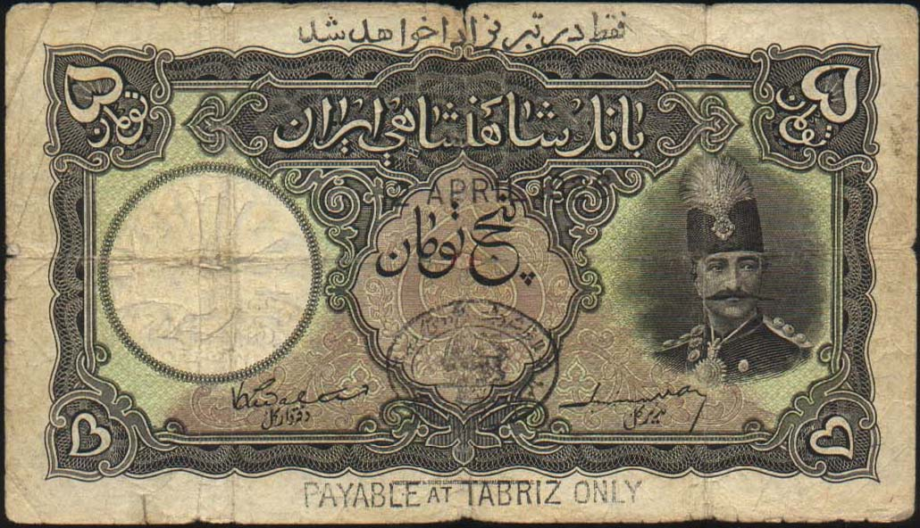 5 персидских туманов. 1928. Аверс. Надпечатка "Только для Тебриза" с надпечаткой, ограничивающей хождение исключительно на территории Иранского Азербайджана.